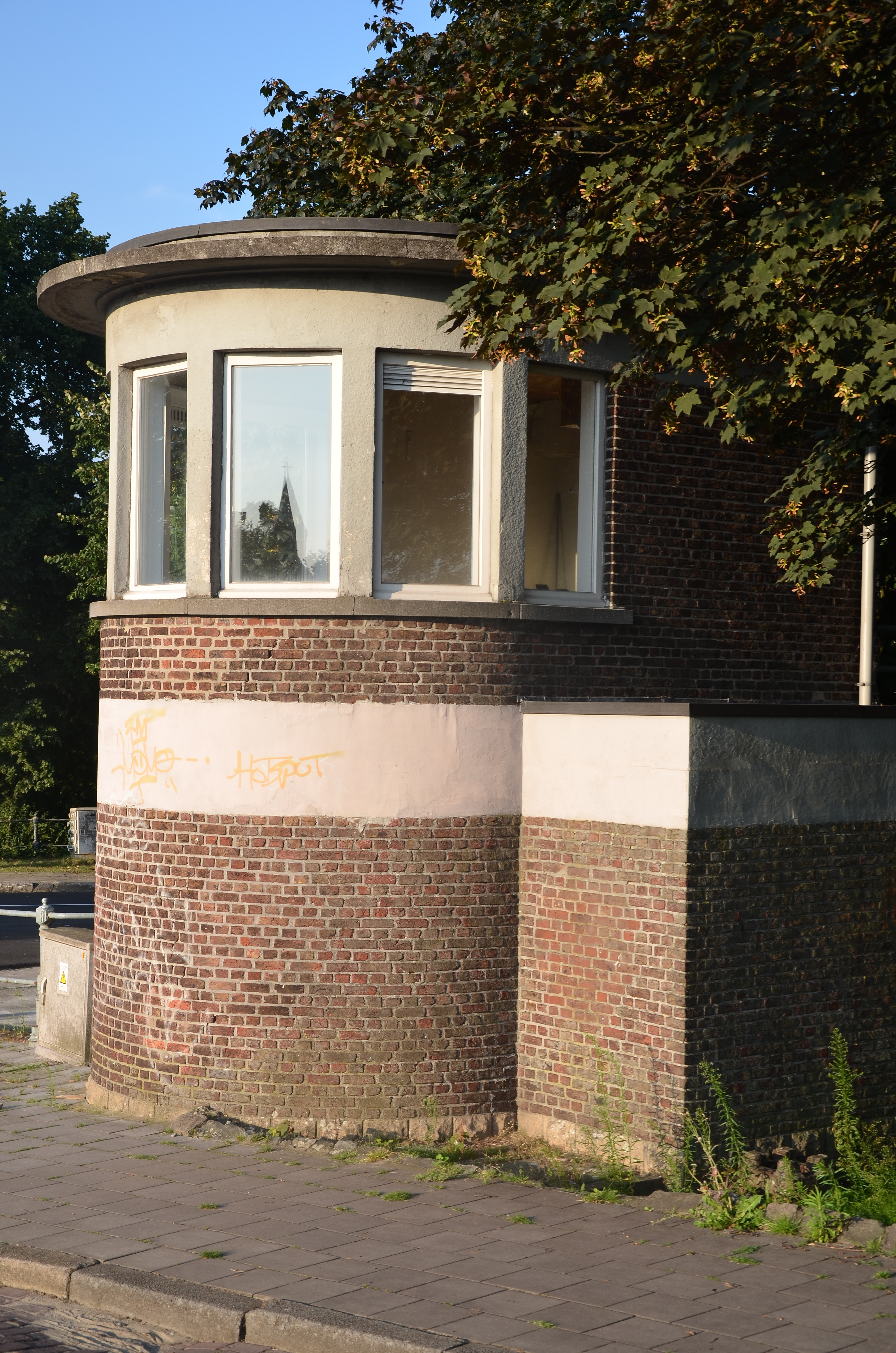 Brugwachtershuisje, Handelsstraat, Duffel